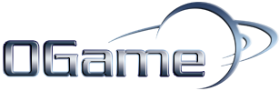 Logo des Browsergames OGame